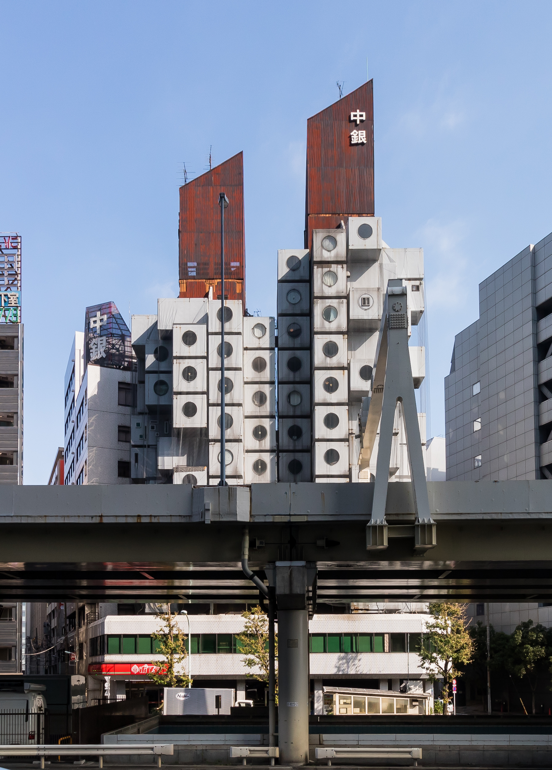 Nakagin Capsule Tower, at Shinbashi Tokyo Japan, design by Kisho Kurokawa in 1972.